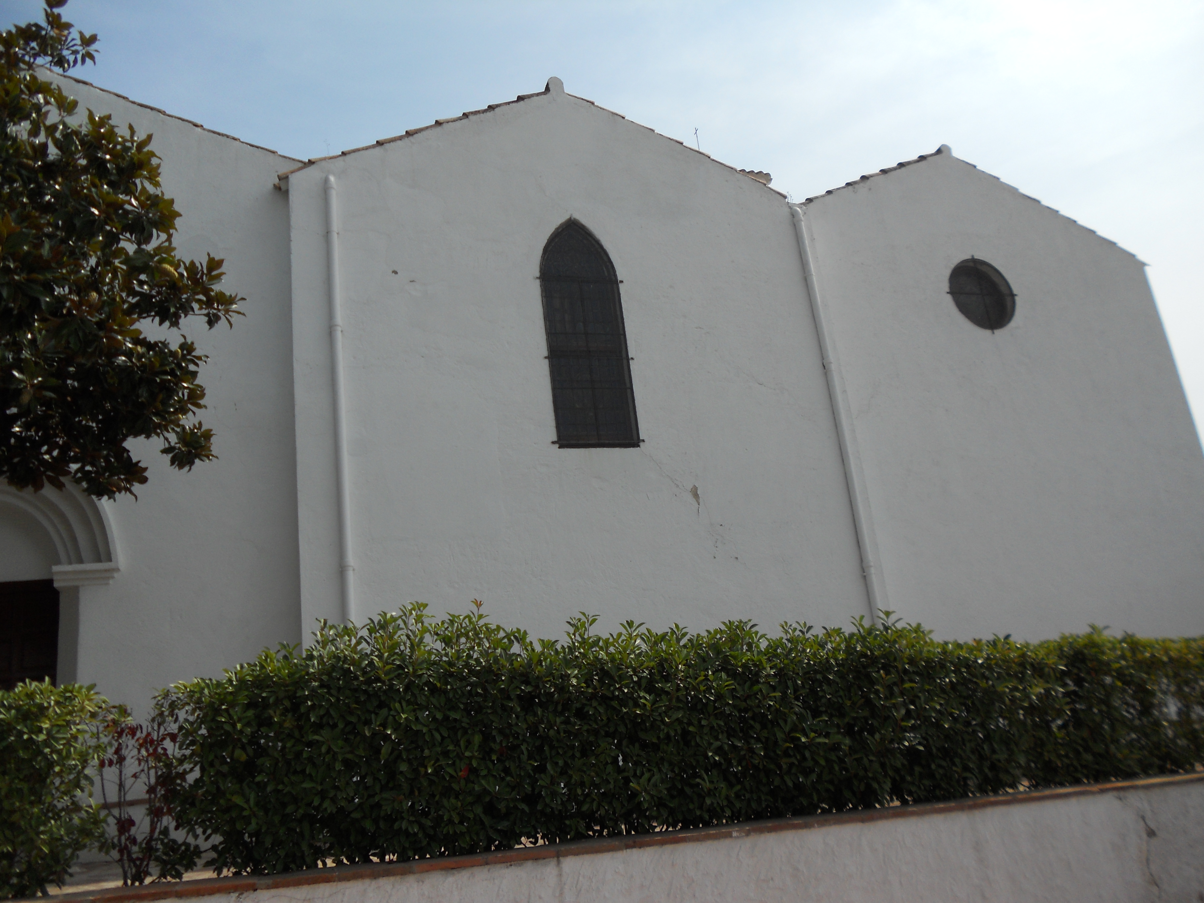 Església de Santa Rosa de Lima, a Llafranc (Baix Empordà).